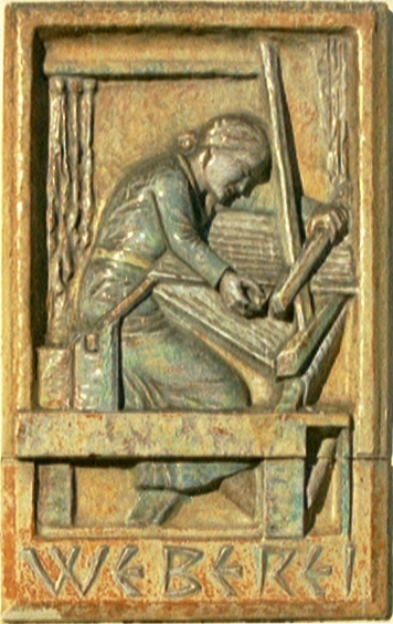 Relief von Kurt Feuerriegel am Bahnhof Frohburg